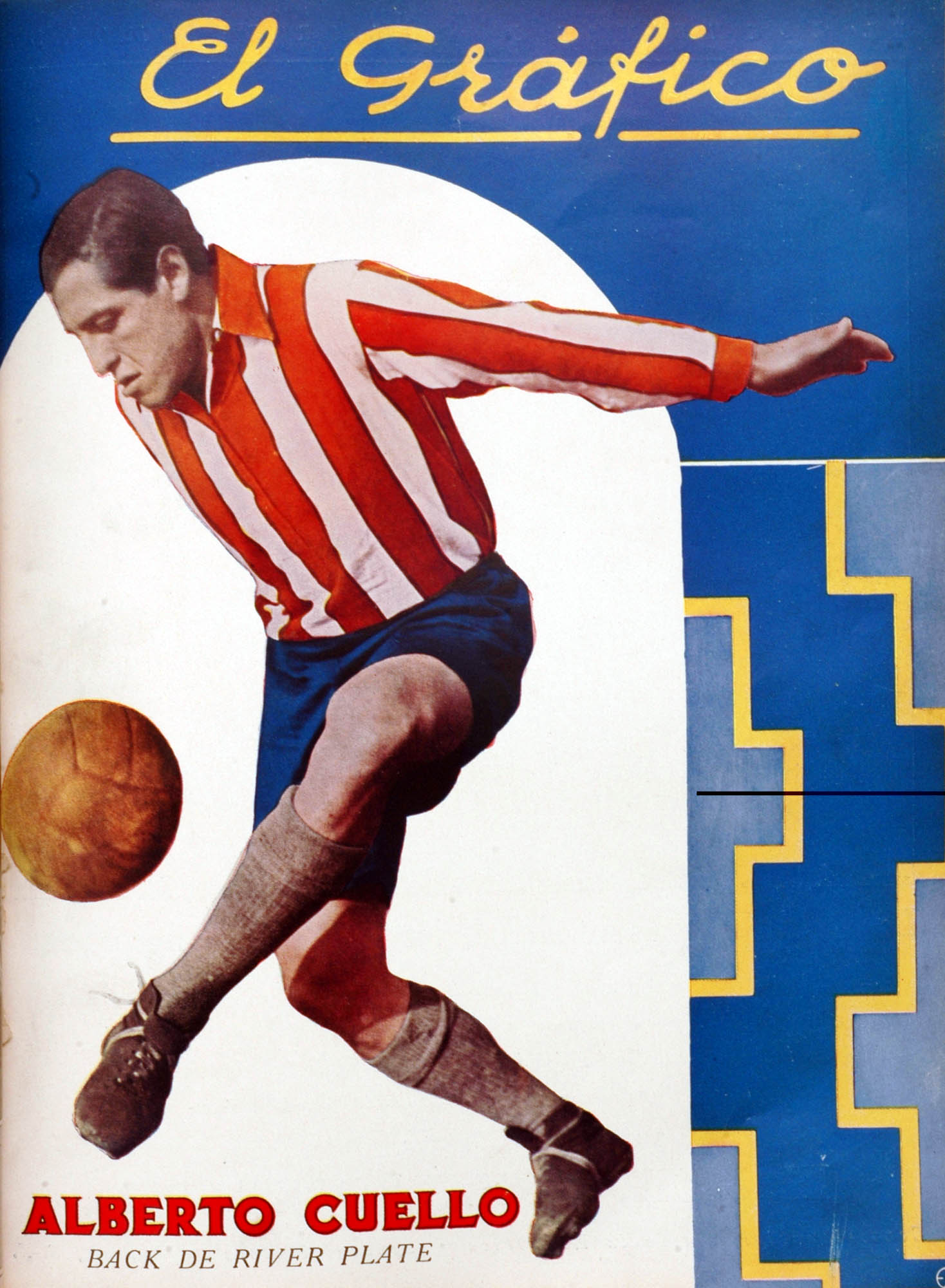 El Grafico del 18 de Junio de 1932. Edicion 675